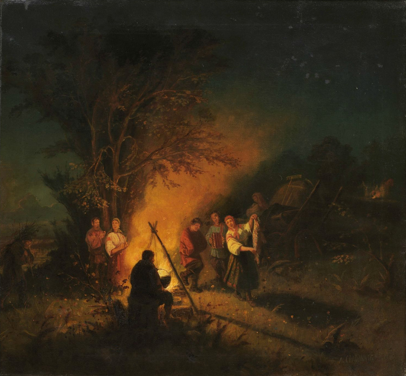 Л. И. Соломаткин. У костра. Середина XIX в.